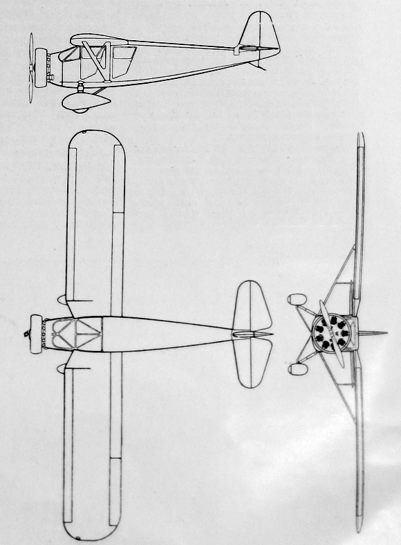 RWD-9 (skica)